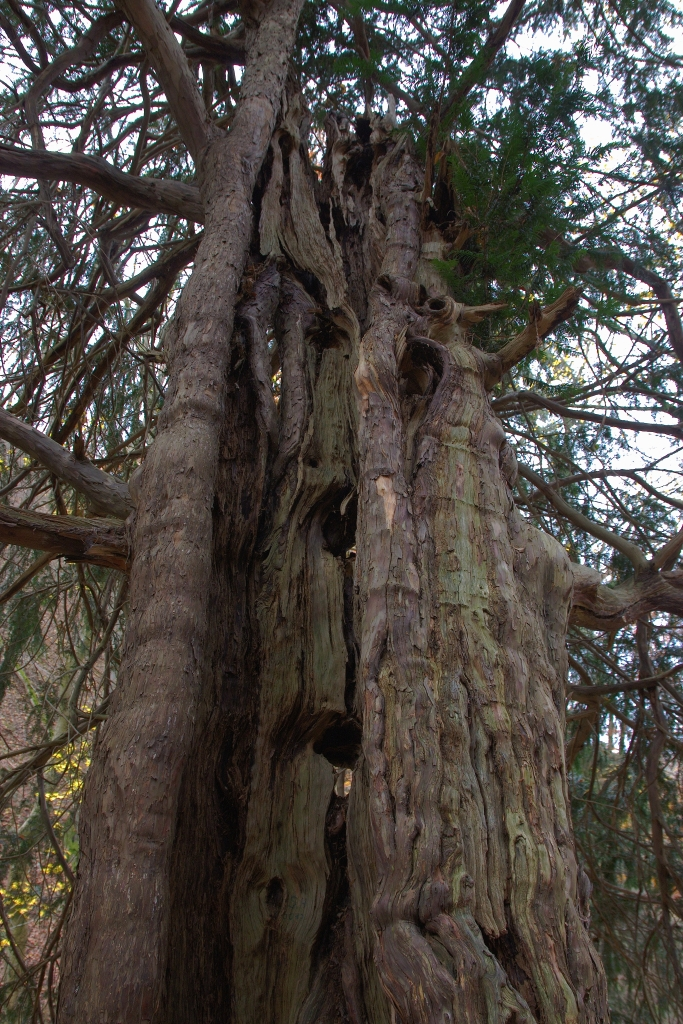 Bodetal-Eibe / Humboldteibe / älteste Eibe Deutschlands